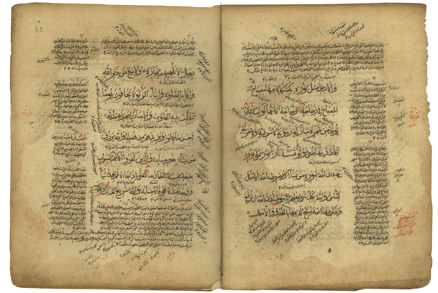 تفسیر ابوالفضل دیلمی جلد دوم نسخه 4028 مجلس